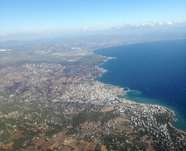 Ραφήνα, Μάτι και Νέος Βουντζάς τον Αύγουστο του 2018.